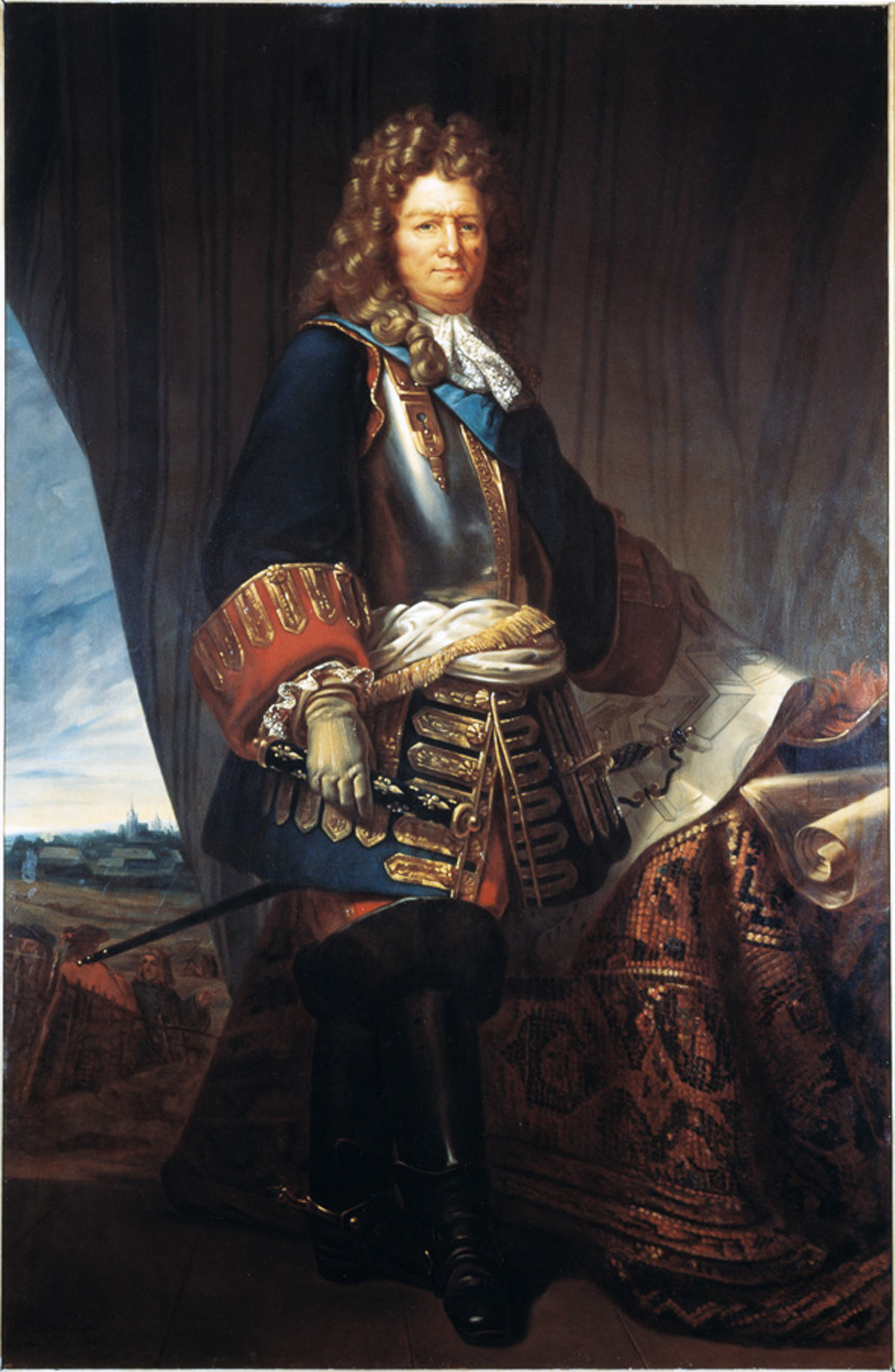 Sebastien le Prestre de Vauban (1633-1707), Maréchal de France